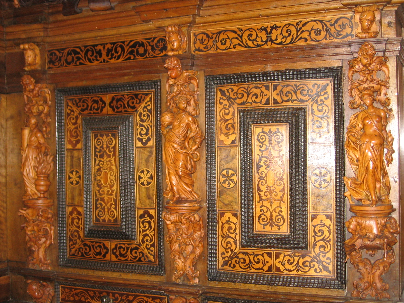 Museo le Sagrestie, Alzano Lombardo, BG (ITALIA)